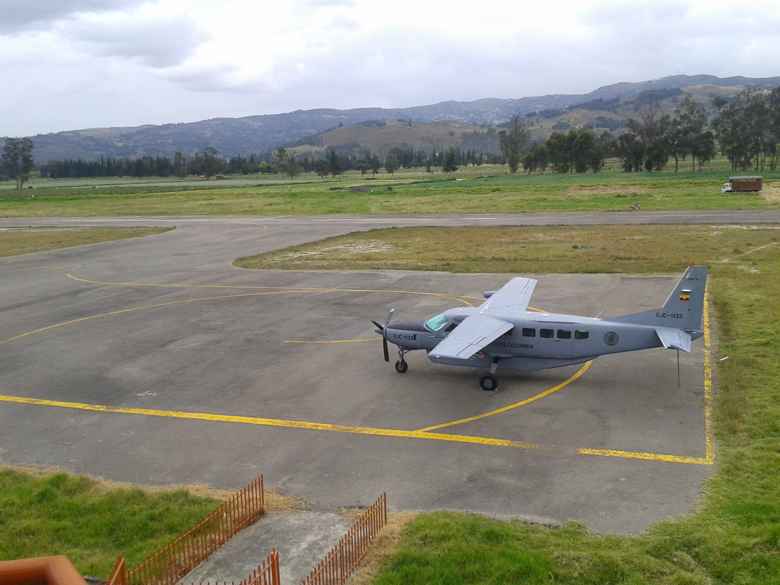 Cessna Gran Caravan del Ejercito de Colombia en el Aeropuerto Alberto Lleras Camargo de Sogamoso.